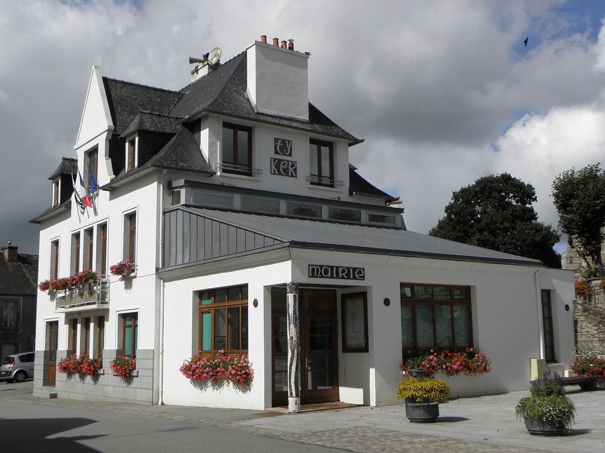 Mairie de Spézet (29).